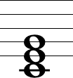 三和音